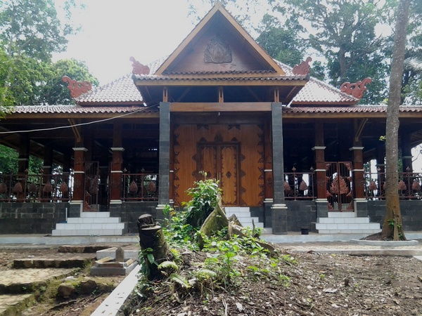 Makam Prabu Geusan Ulun di Komplek Dayeuh Luhur